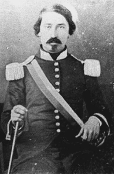 Coronel José Víctor Zavala